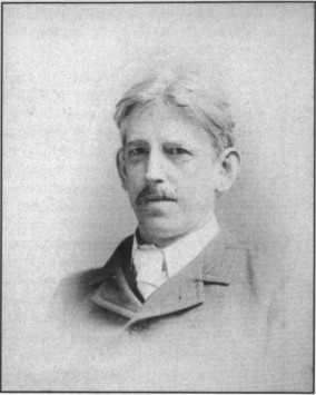 Samuel Liddell MacGregor Mathers (1854-1918) en av de tre grunnleggerne av the Hermetic Order of the Golden Dawn.